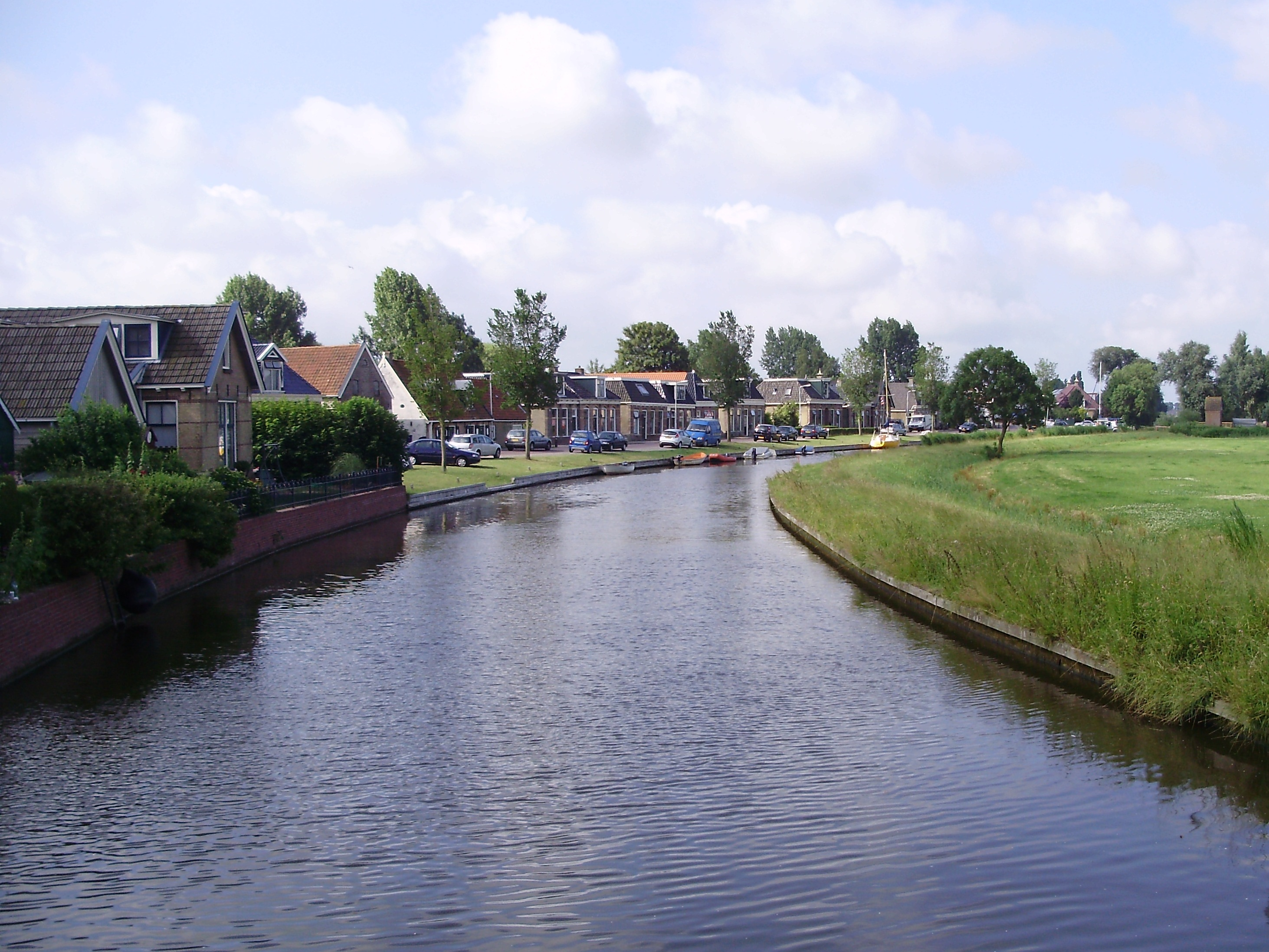 De Workumertrekvaart bij Tjerkwerd in Friesland